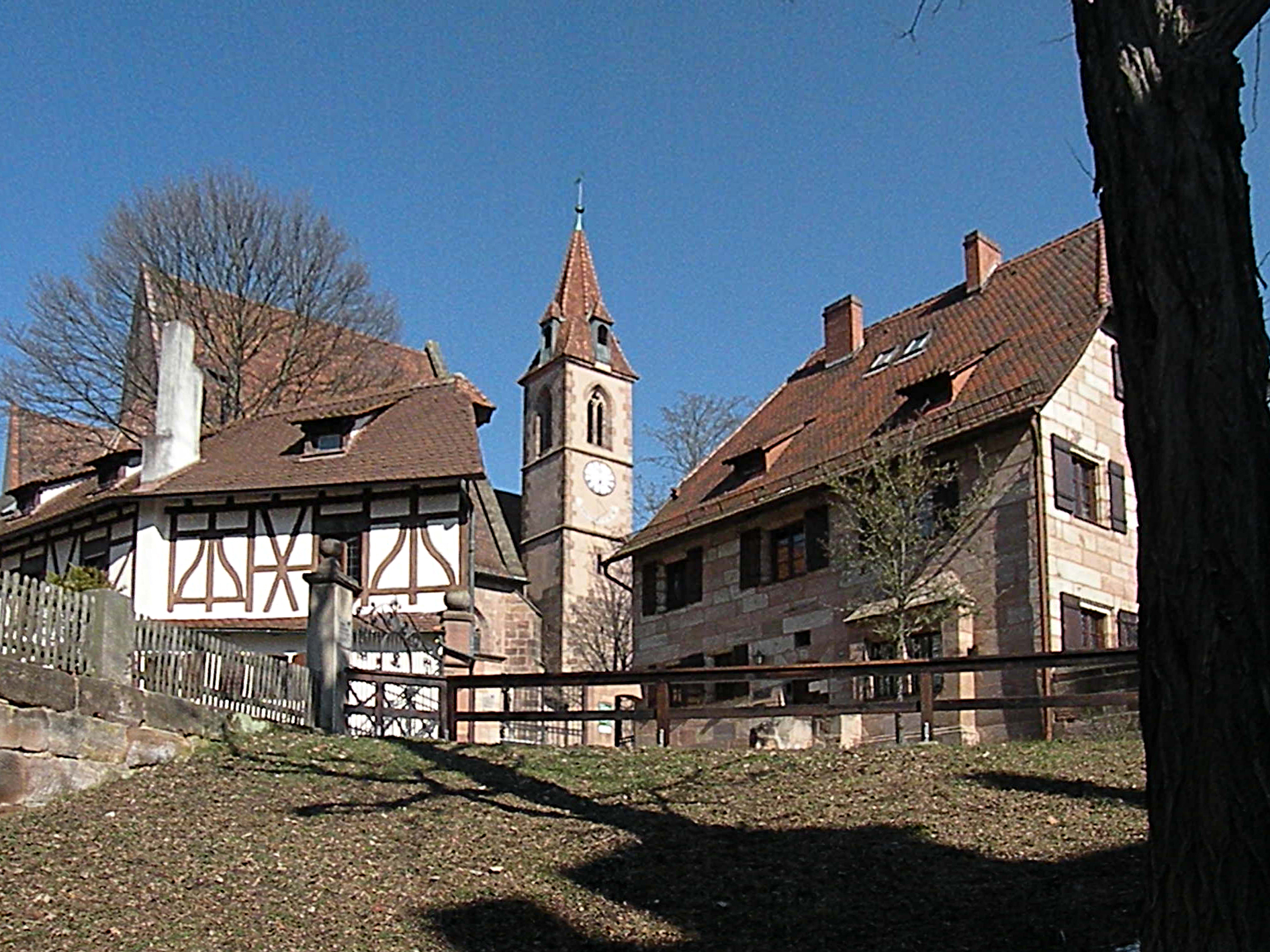 Могельдорф (Нюрнберг). Церковь и её окружение